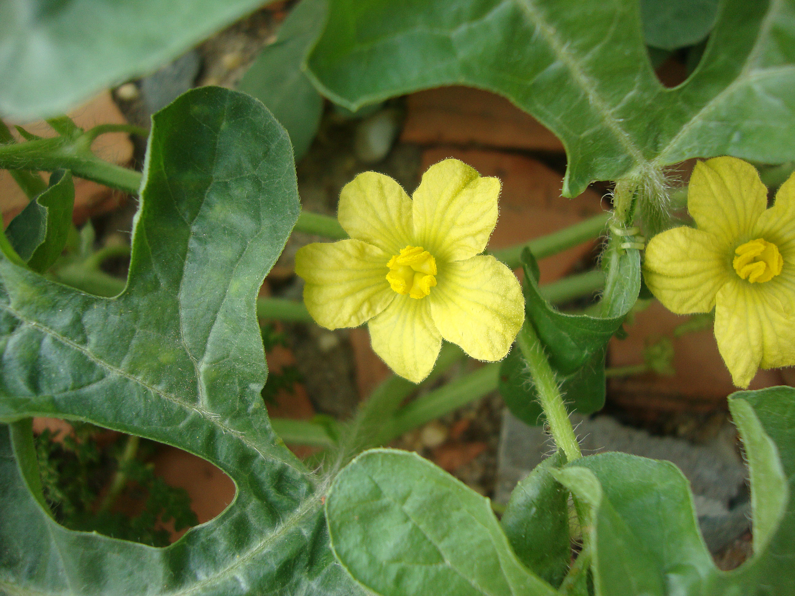 Citrullus lanatus (Thunb.) Matsum. & Nakai, 1916Tiếng Việt: Dưa hấu